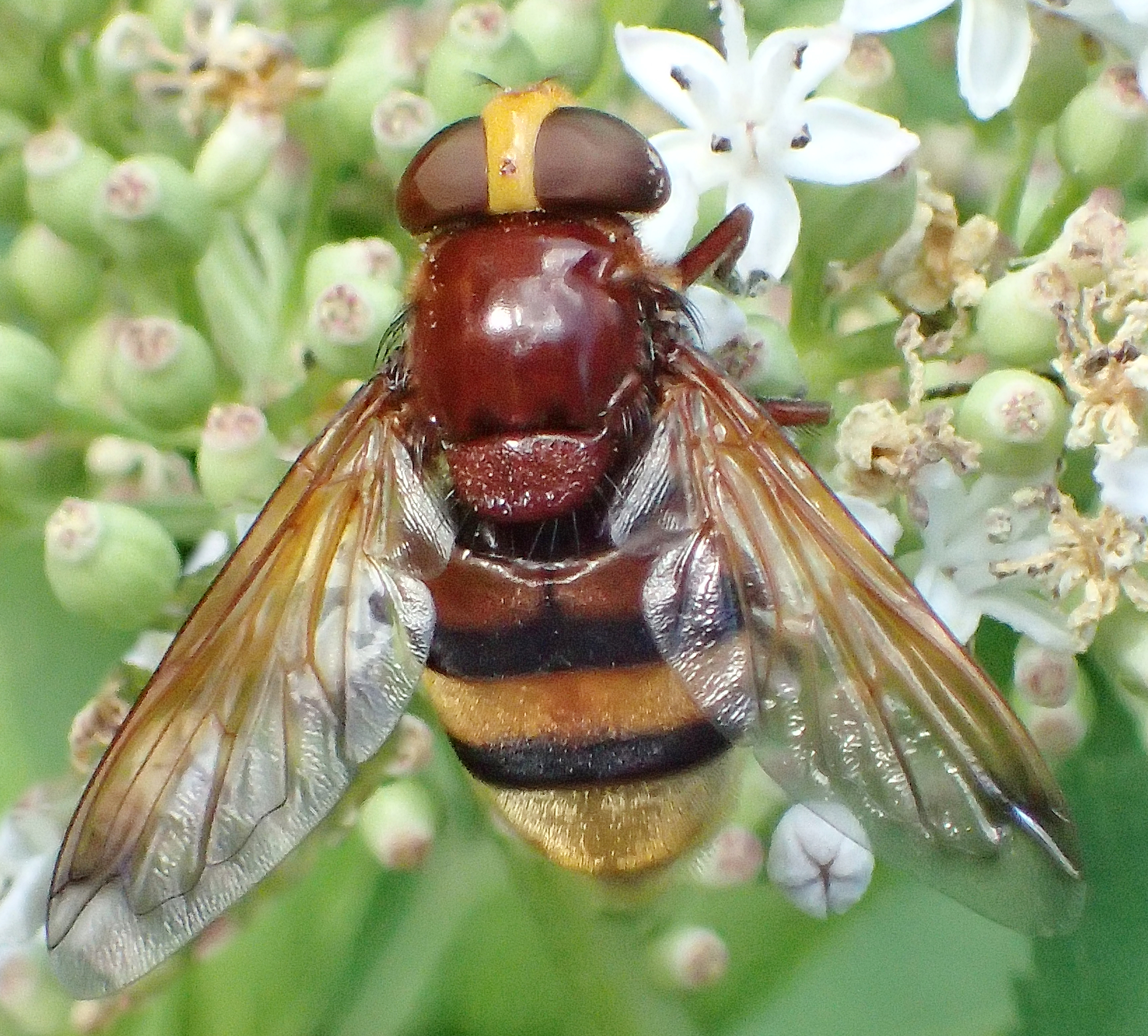 Volucella zonaria aus Griechenland, Peloponnes, bei Kosmas